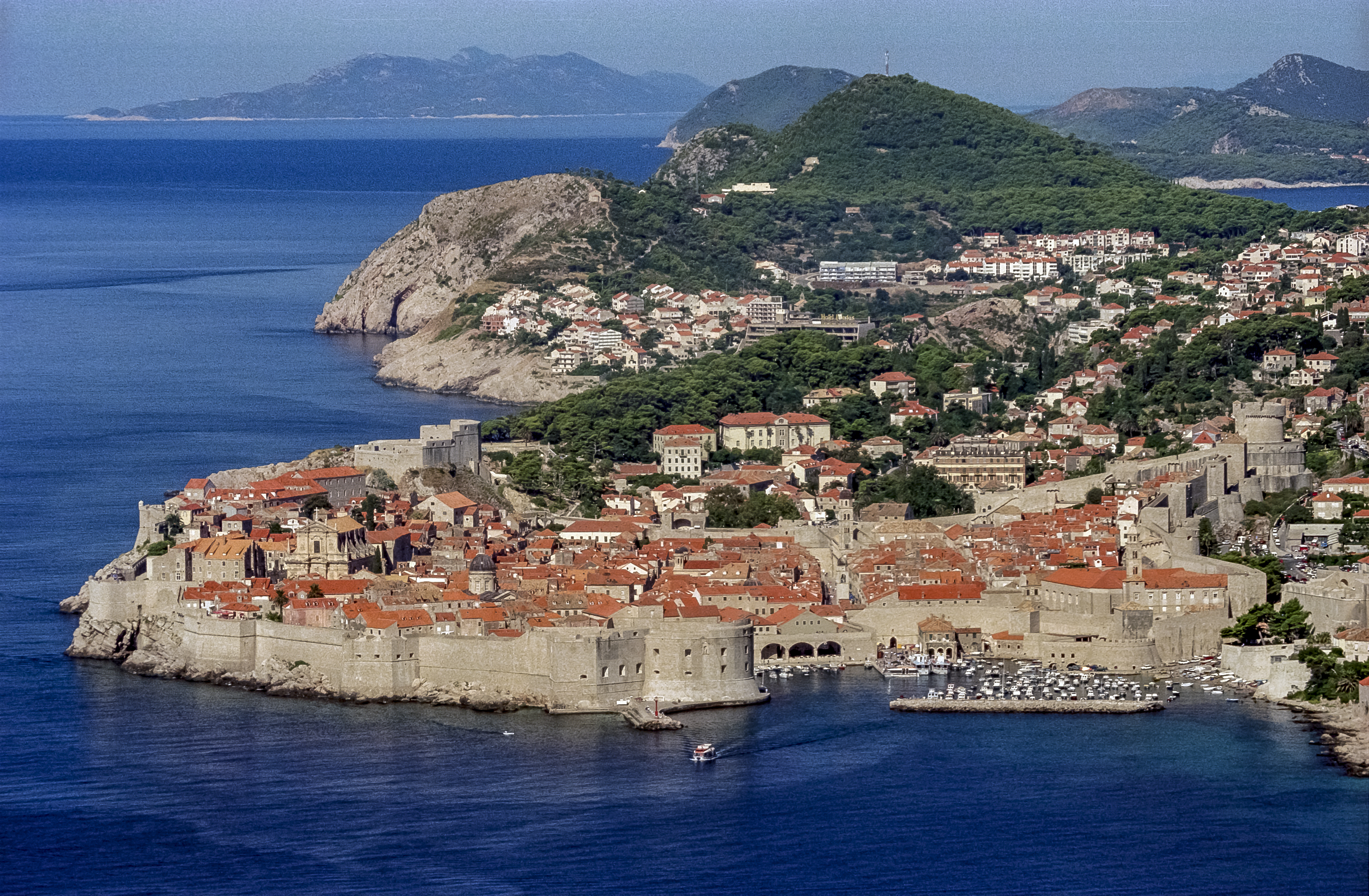 Dubrovnik, general view